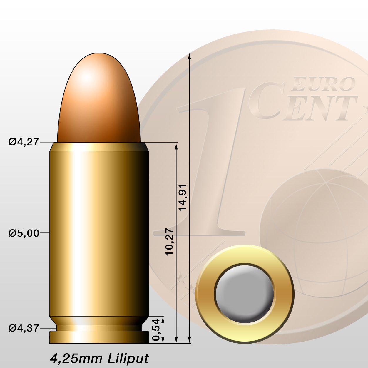 Die Munition der „Erika“- und „Liliput“-Taschenpistolen ist kleiner als ein Eurocent